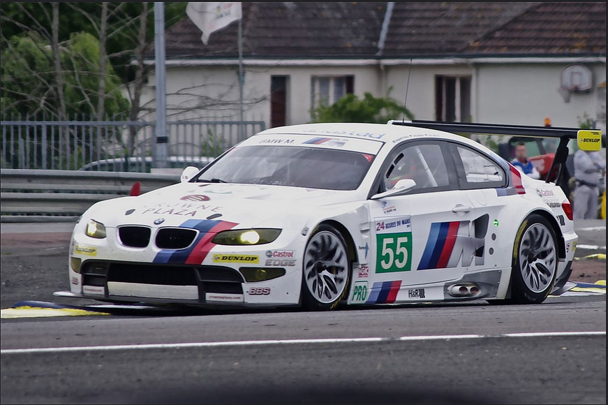 Photographie de la BMW M3 GT2 d'Augusto Farfus, de Jorg Müller et de Dirk Werner aux 24 Heures du Mans 2011